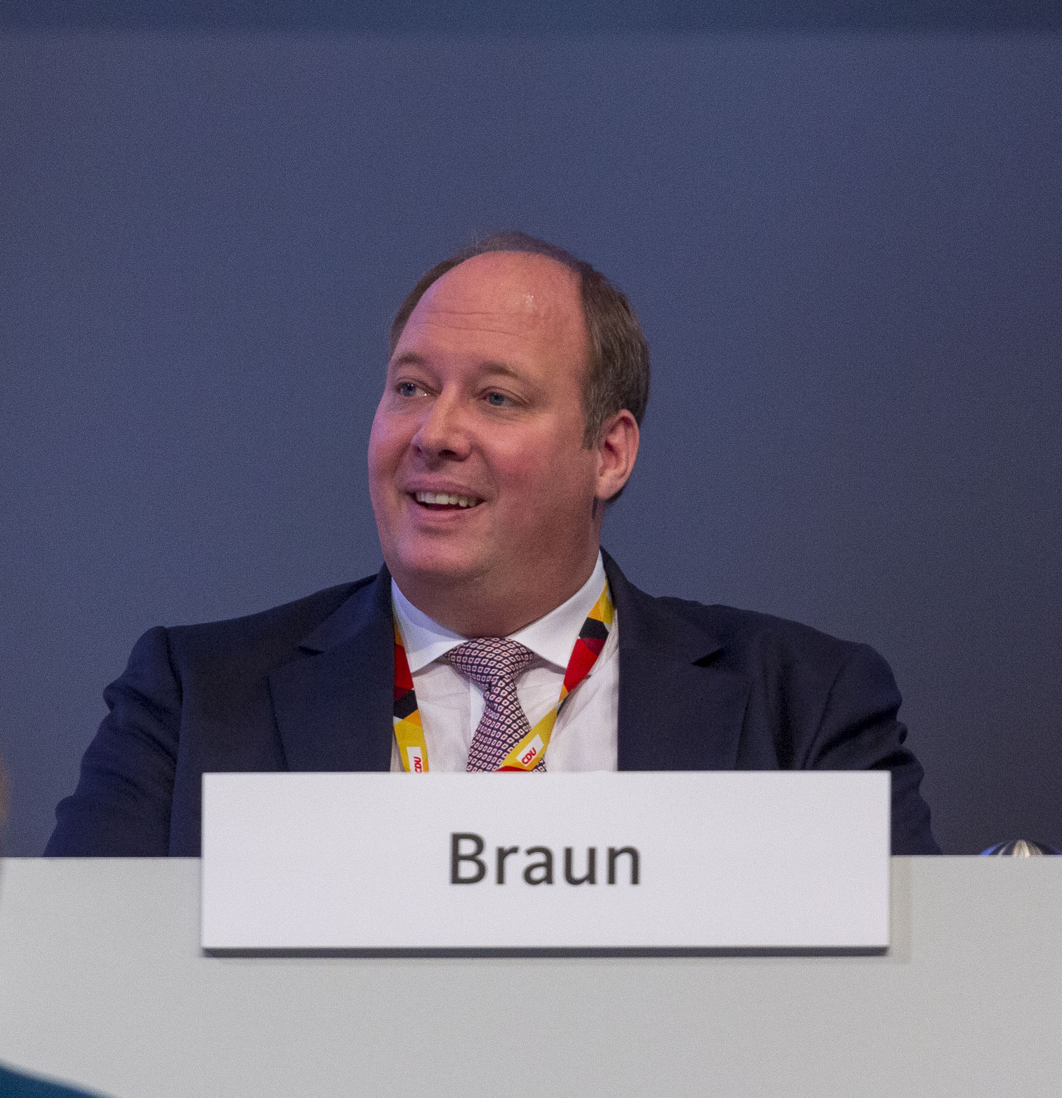 Helge Braun auf dem CDU Parteitag 2019 am 23. November 2019 in Leipzig.